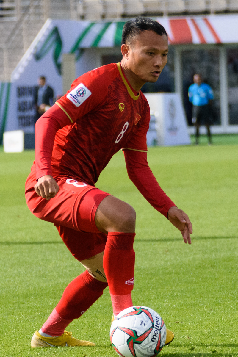 Nguyễn Trọng Hoàng at the Asian Cup 2019